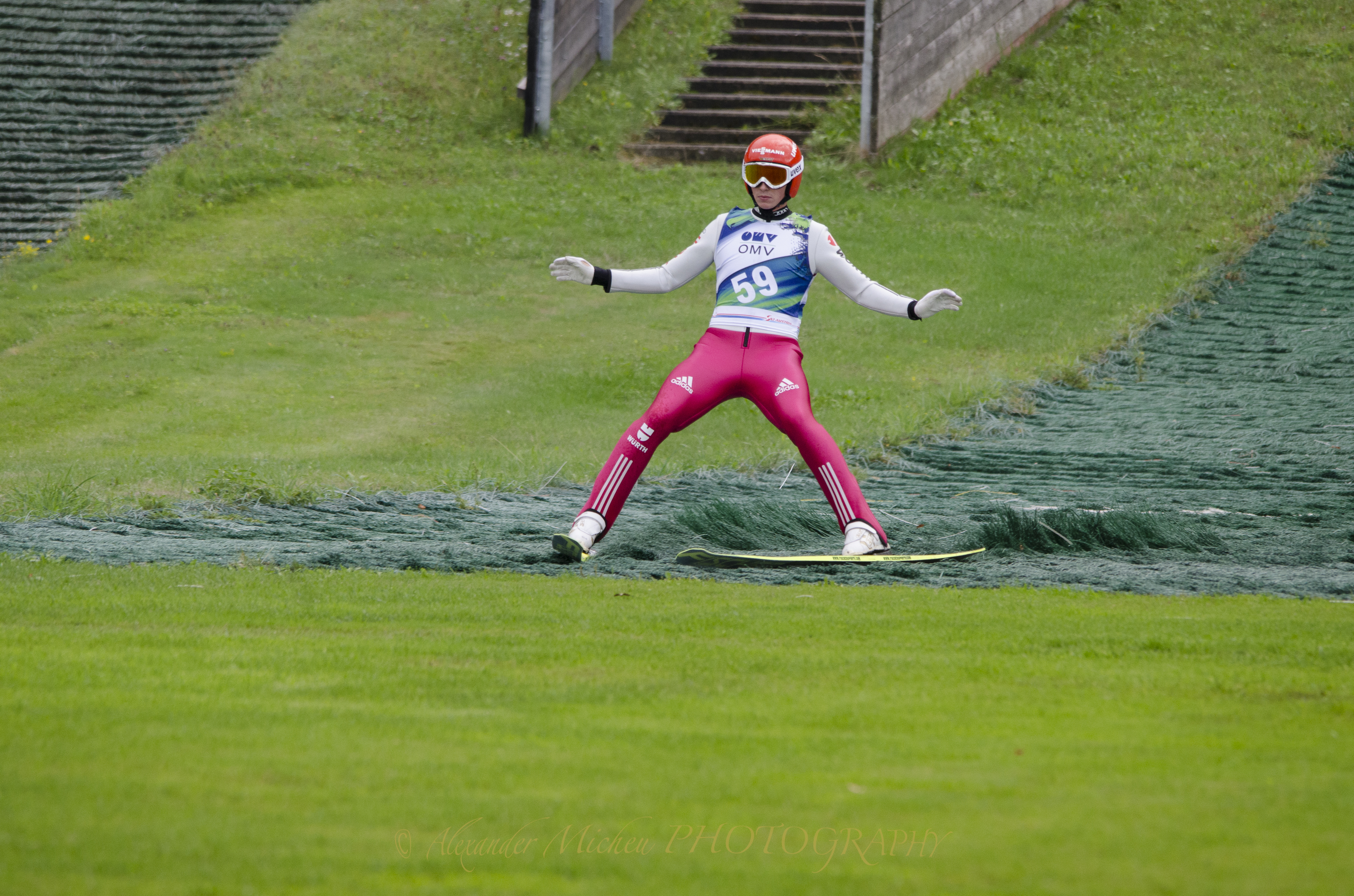 FIS Sommer Grand Prix Nordische Kombination 27. / 28. August 2013 Villach Möltschach